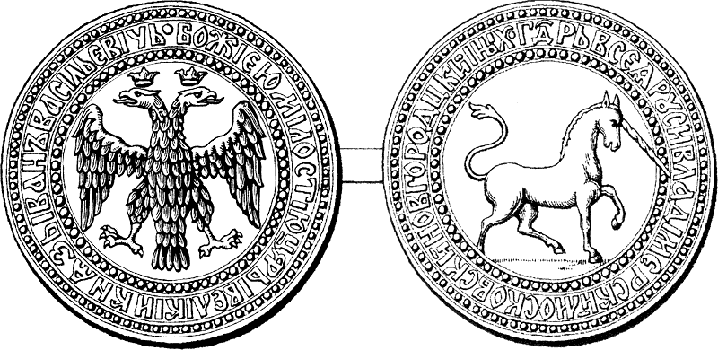 Малая печать Ивана IV Васильевича. Лицевая (двуглавый царский орел) и оборотная (единорог - символ чистоты и девственности, непобедимости) стороны. Прорись по А. Б. Лакиеру.